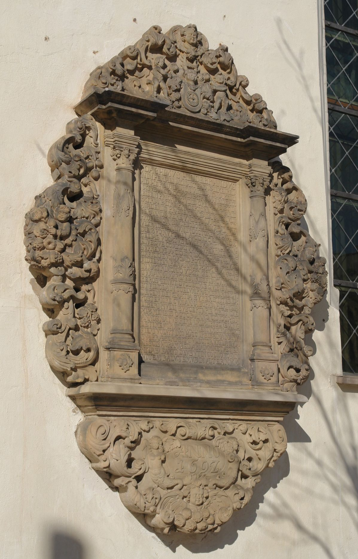 Steintafel an der Celler Stadtkirche zu Ehren von Joachim Hildebrand geboren 1623 im Kloster Walkenried, Schüler von Georg Calixt, Generalsuperintendent in Celle, 1691 in Celle gestorben.